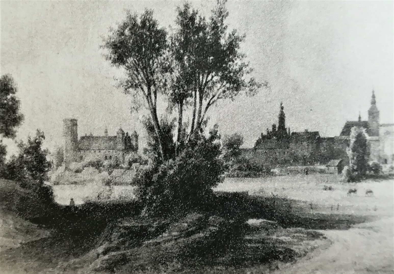 Lidzbark Warmiński. Litografia wg rysunku Ferdinanda von Quasta - 1848 r.